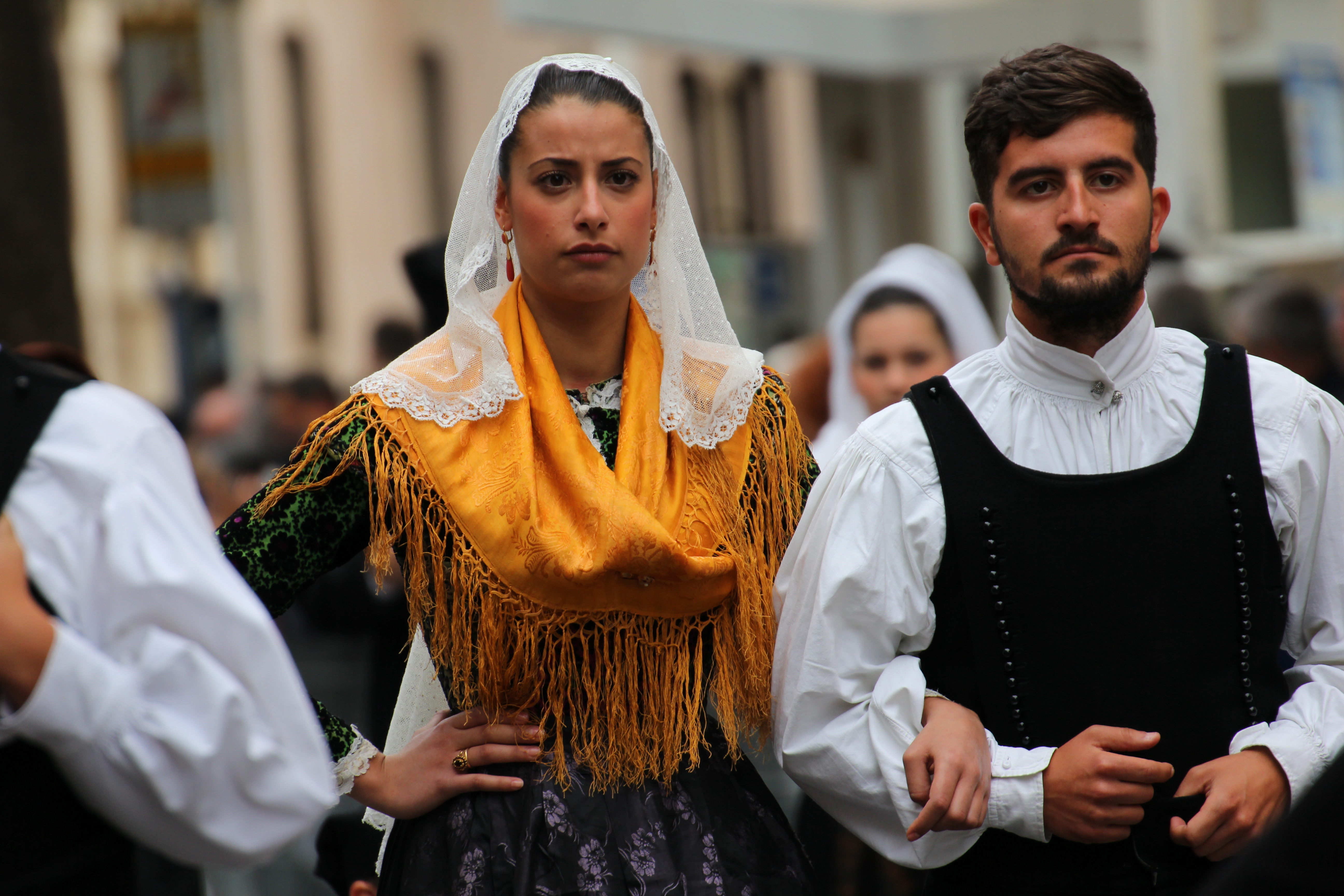 Costume tradizionale